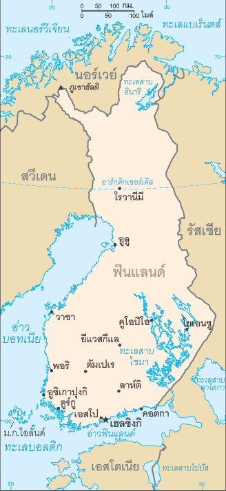 แผนที่ประเทศฟินแลนด์